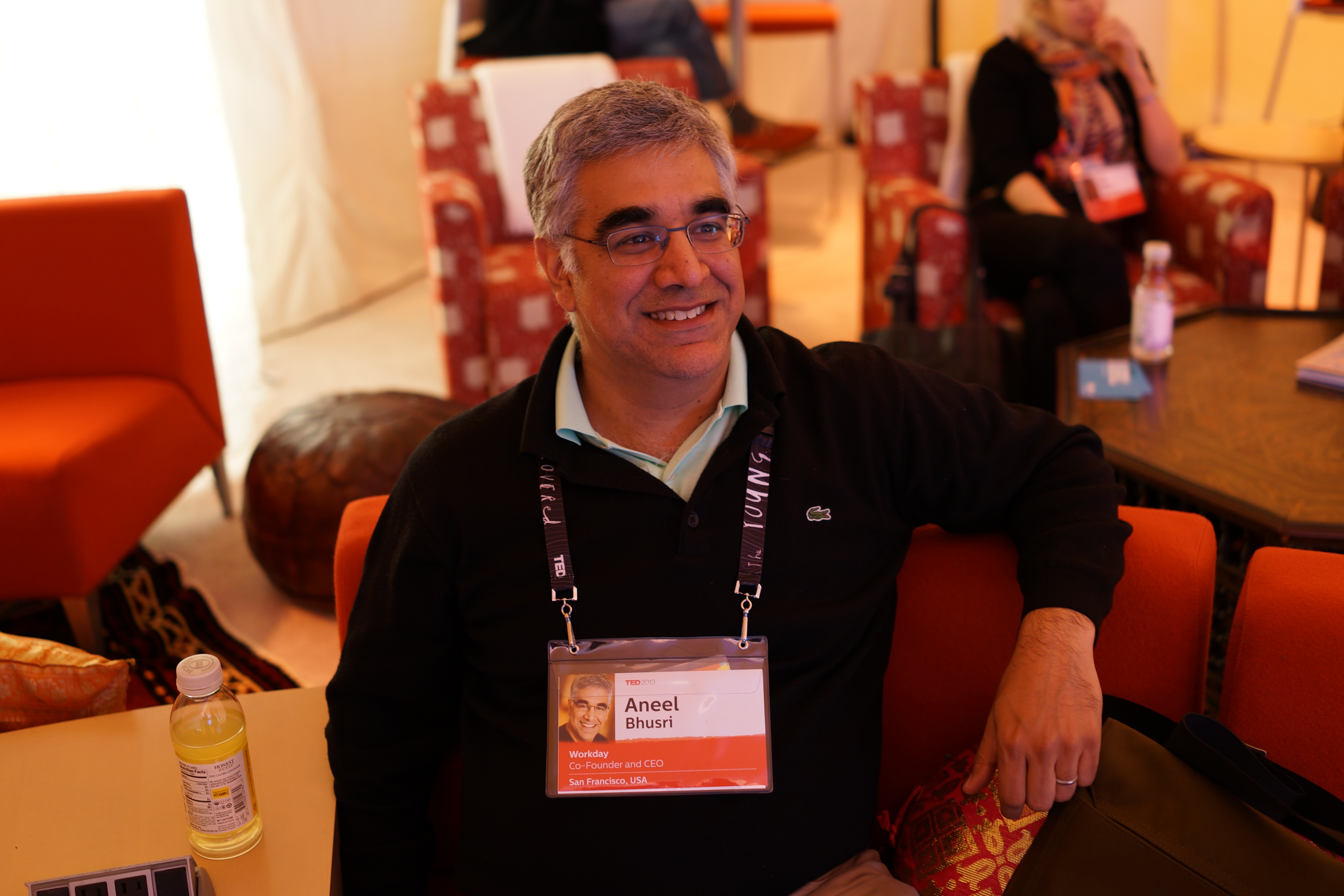 Aneel Bhusri in 2013.